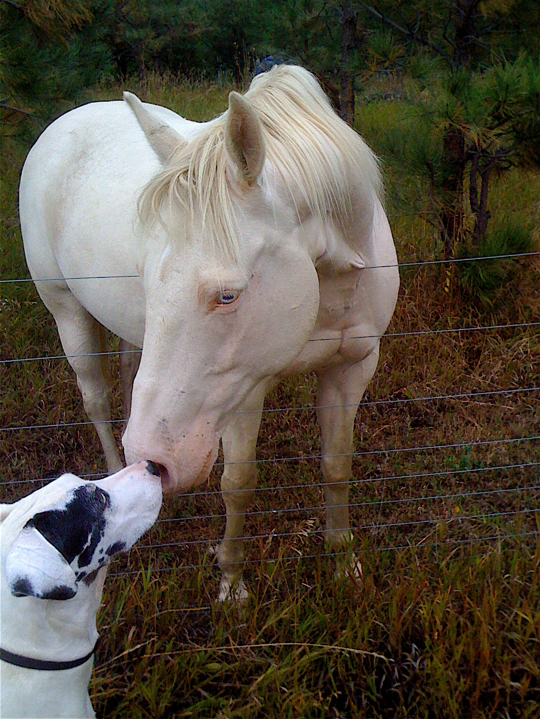 Cremello and great dane